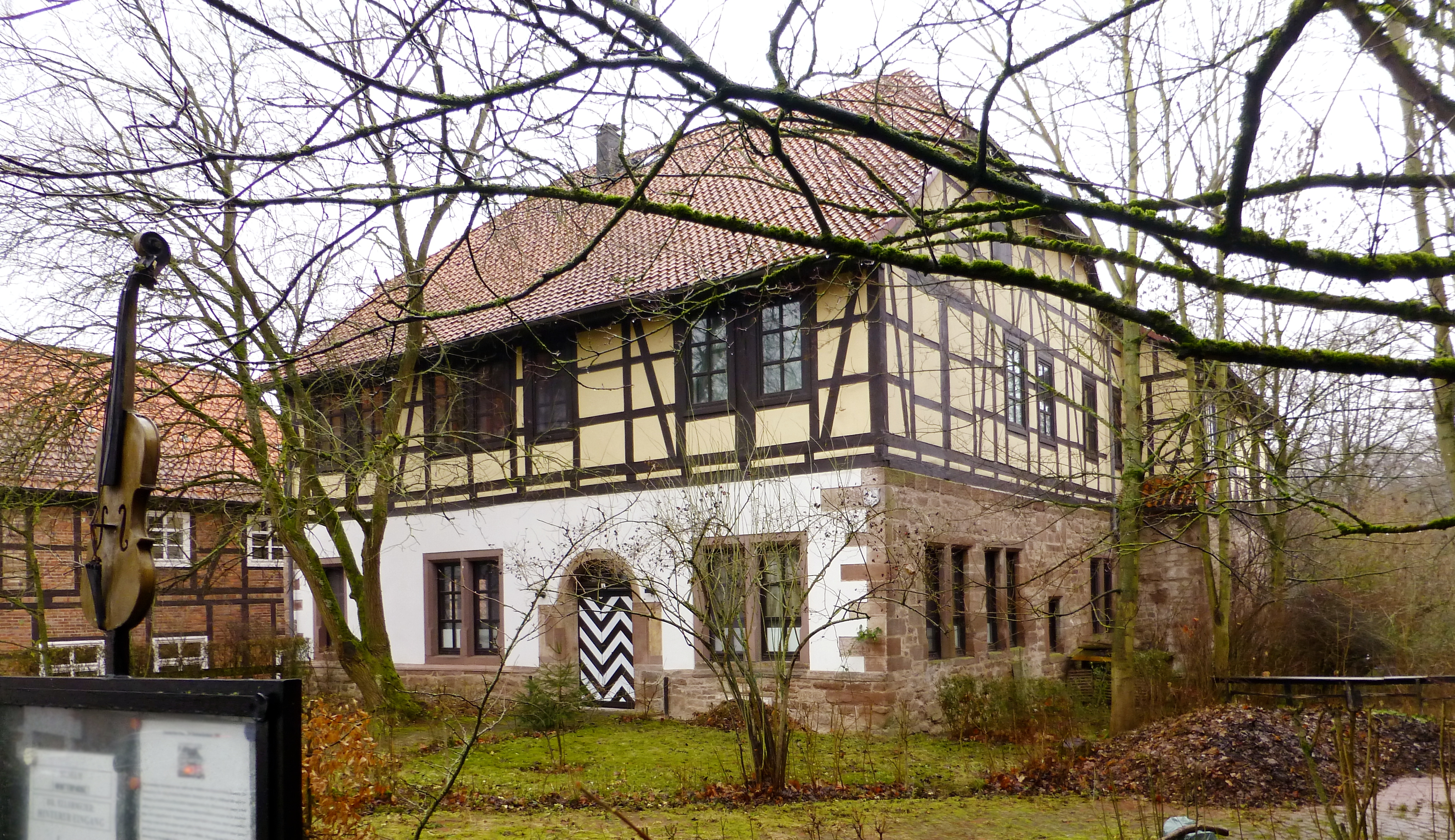 Zweiter Burgmannshof, Hardegsen, Südniedersachsen. Früher Burglehen aus der Zeit der Herren von Rosdorf (13./14. Jahrhundert), Umbau ab 1559 durch Dr. Georg Barthold Ostmann, ab 1978 durch Friedrich Ellermeier restauriert, 1984 mit den Deutschen Preis für Denkmalschutz (Silberne Halbkugel) ausgezeichnet. Nordostansicht